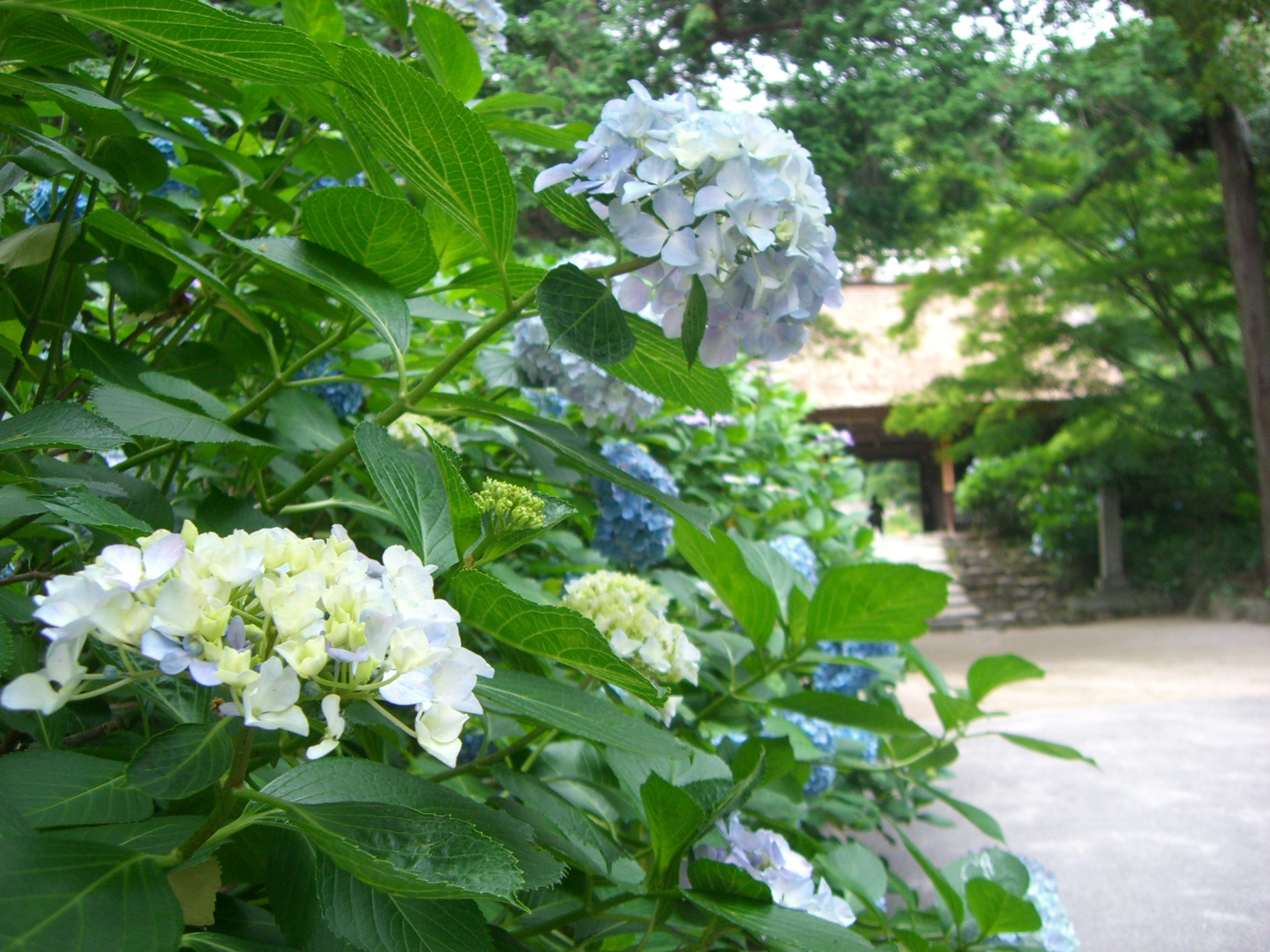 周防阿弥陀寺の山門前で咲いているアジサイ